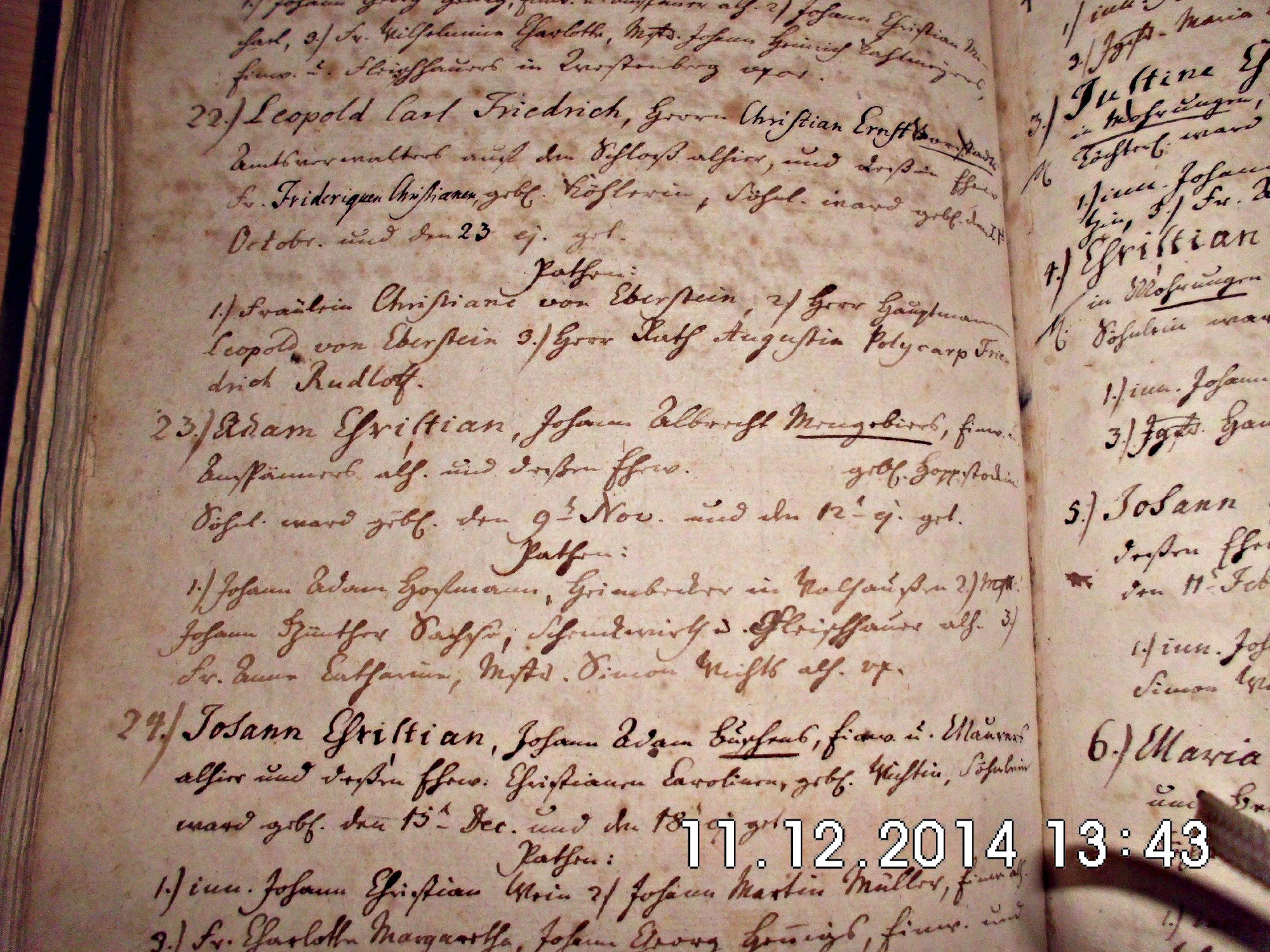 Nr. 23 des Taufregisters: [...]"Adam Christian, Johann Albrecht Mengebiers, Einw. Anspänner allh. und dessen Eheweib................geb. Hoppstockin Söhnlein ward geb. den 9. Nov. und den 12. Nov. getauft".